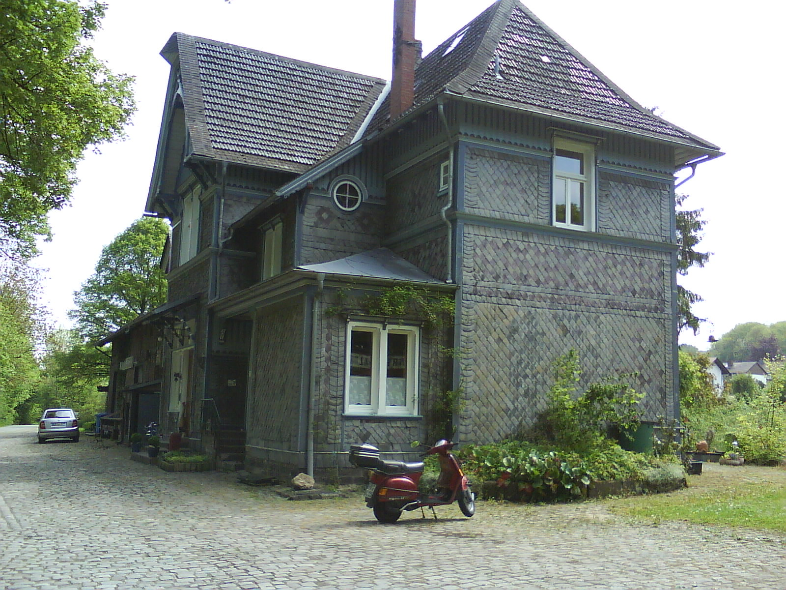 Der Bahnhof Warburg-Altstadt der seit 1977 stillgelegten Bahnstrecke Warburg-Volkmarsen.